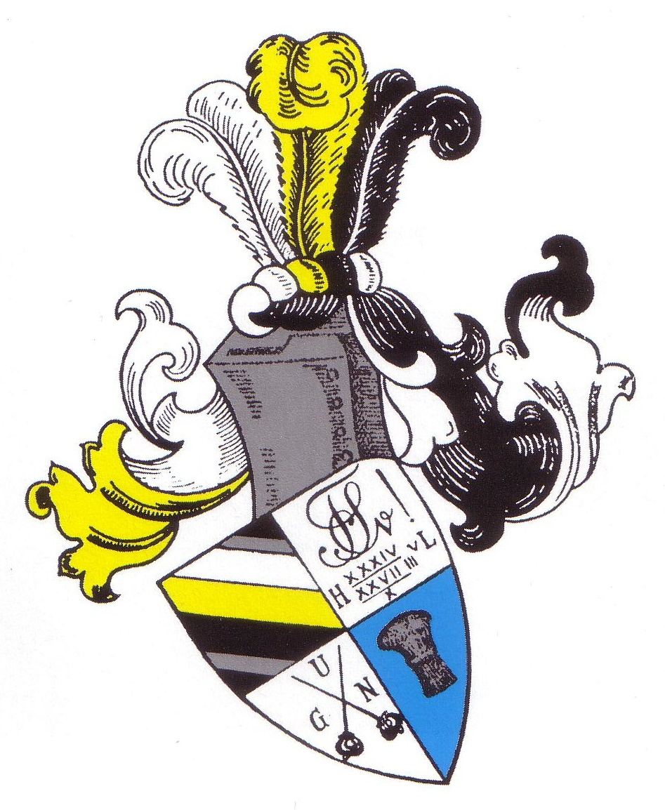 Studentenwappen des Corps Suevia Heidelberg